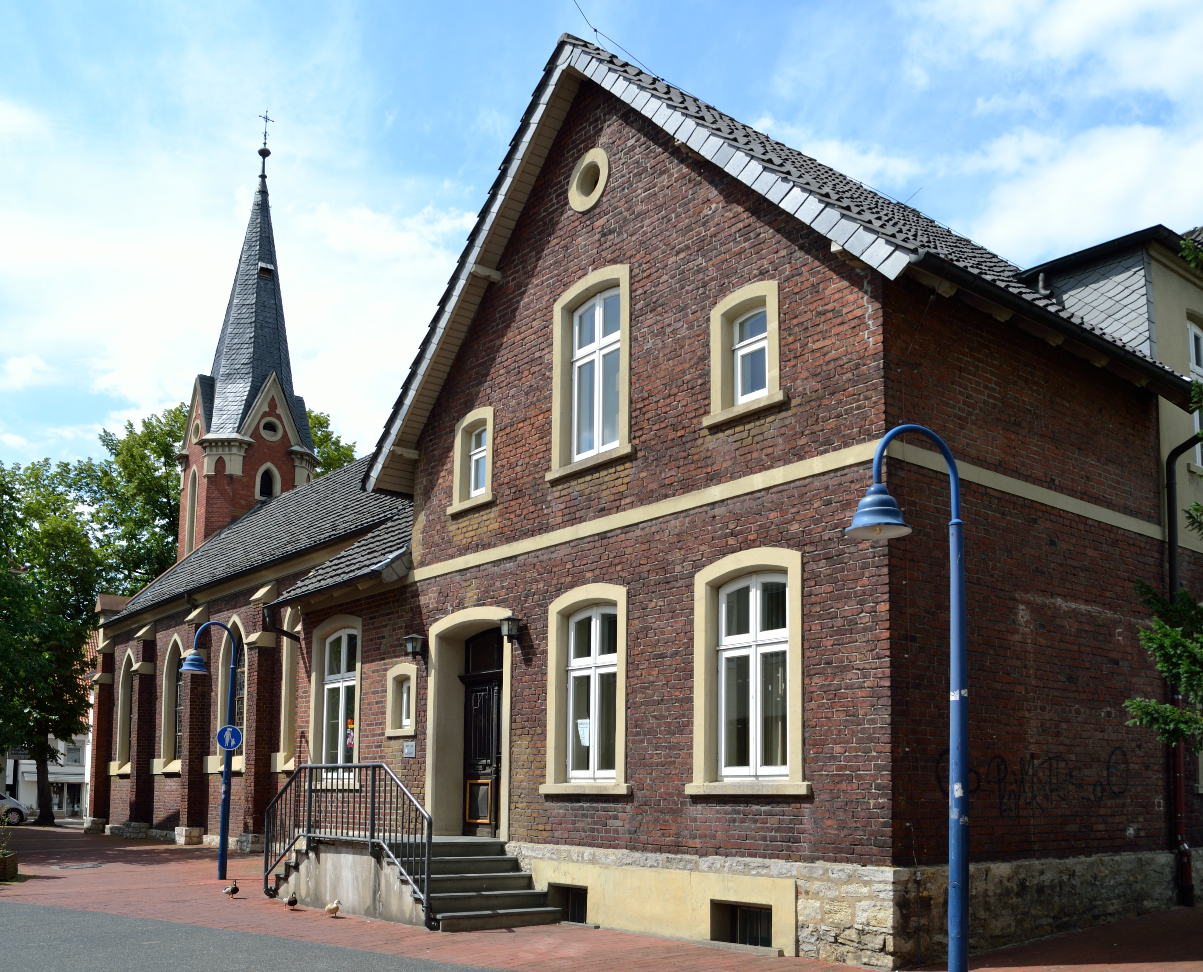 Ehemalige katholische Kirche This is a photograph of an architectural monument.